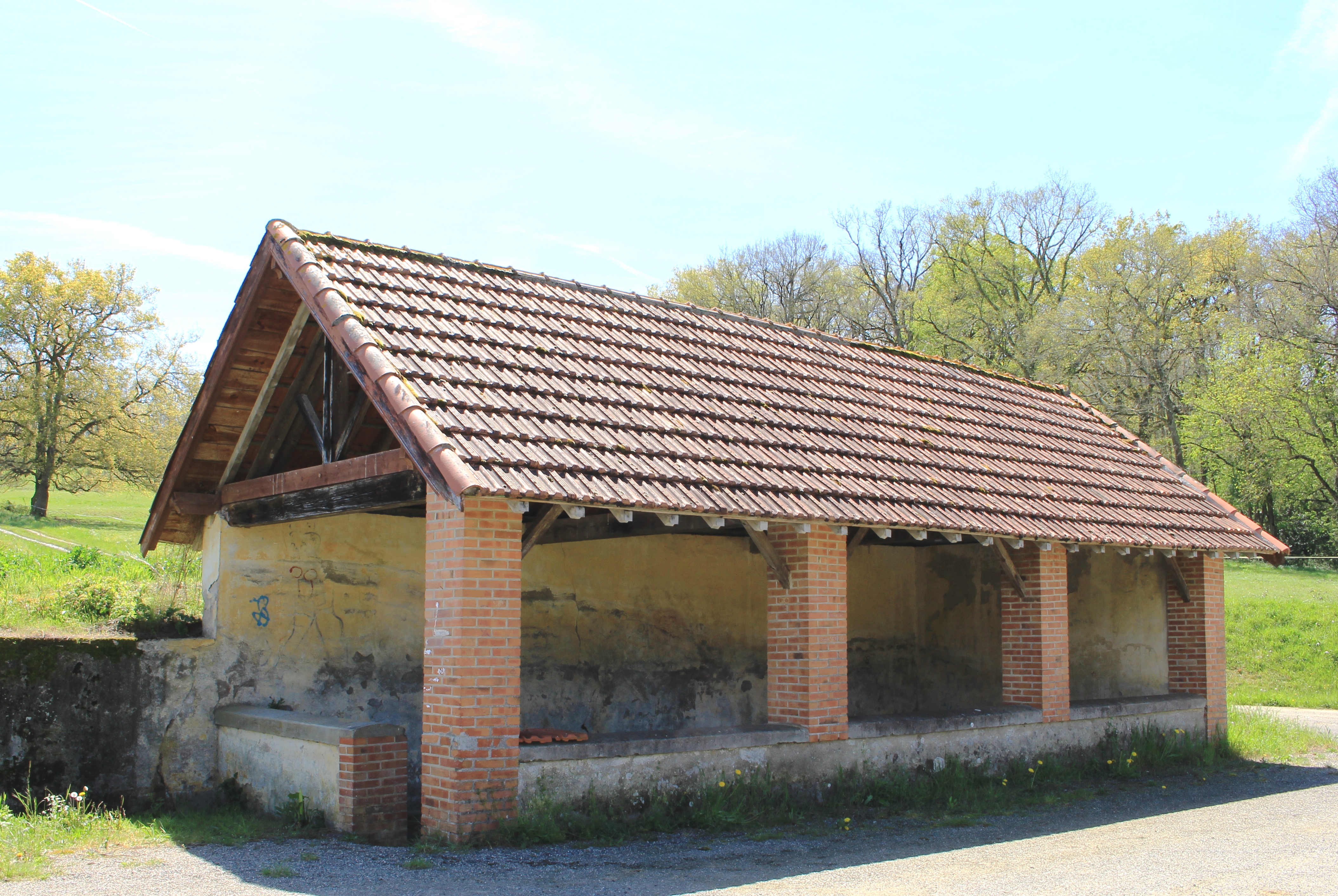 Lavoir de Castéra-Lou (Hautes-Pyrénées)